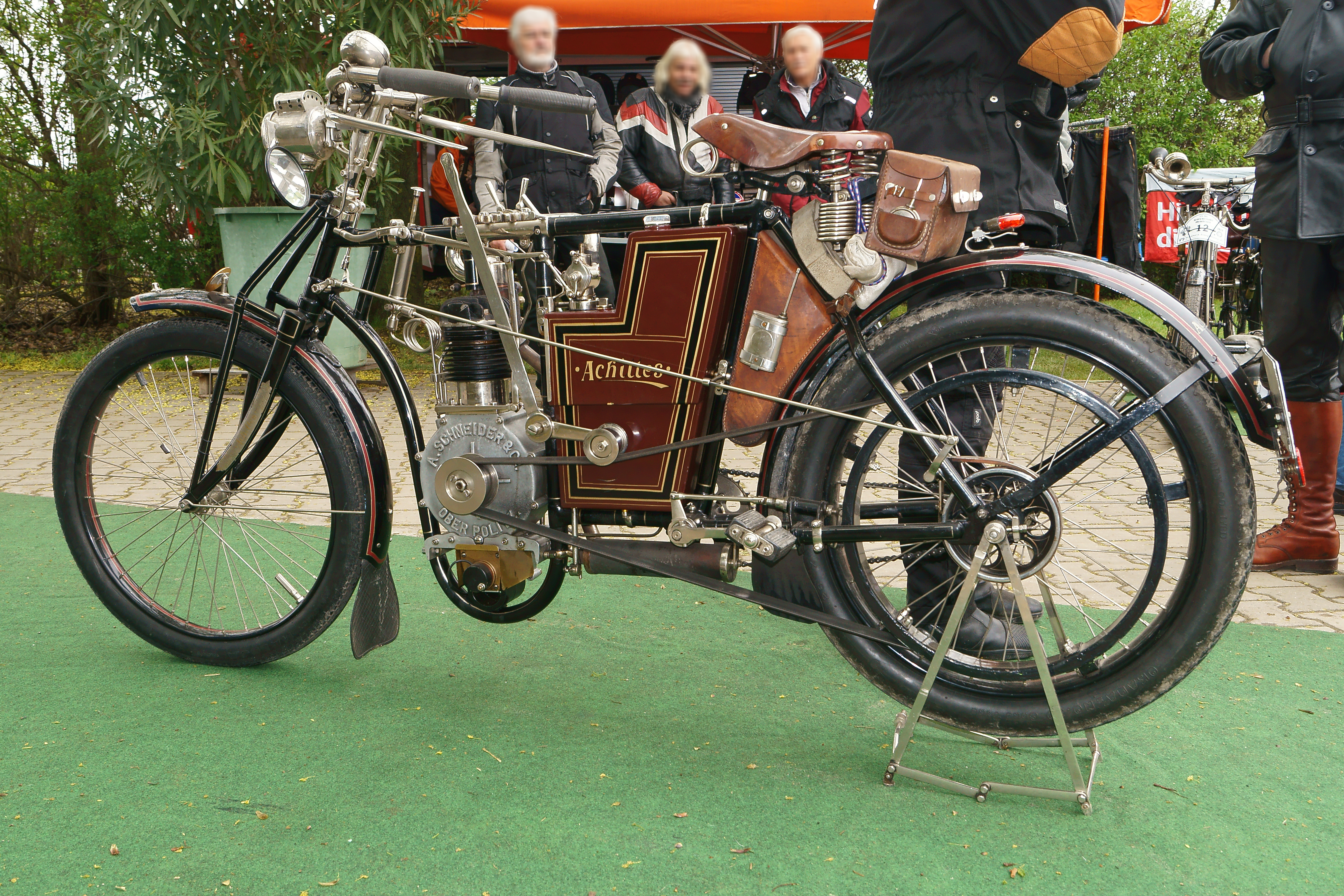 Achilles T5 Baujahr 1901, 500 ccm. Hersteller war die A. Schneider & Co Fahrrad- und Motorfahrzeugfabrik in Ober-Politz a. d. Nordbahn.